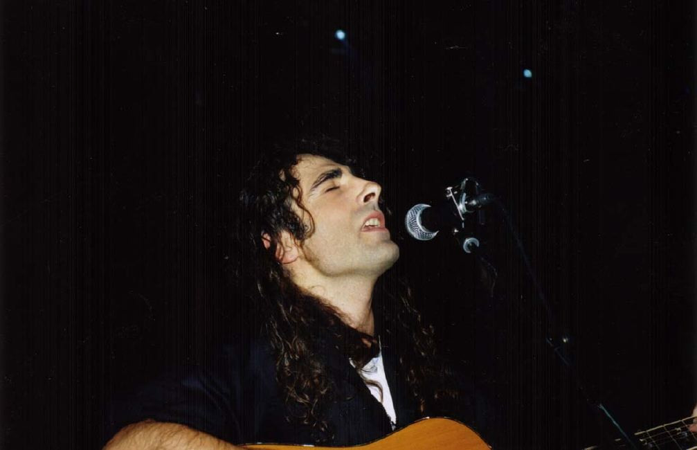 en 1999 au Cabaret Sauvage